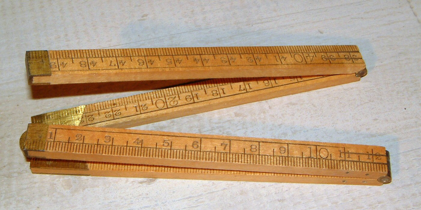 a 50 cm boxtree foldable ruler